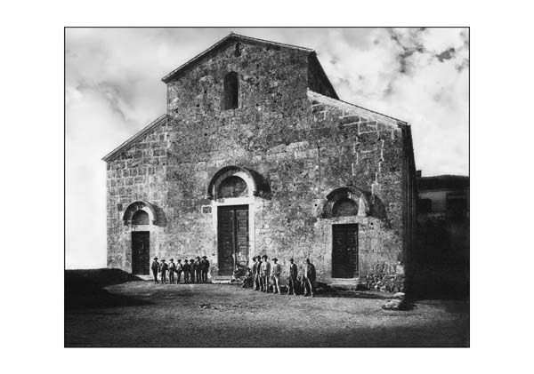 foto di Ferentino dei primi del novecento